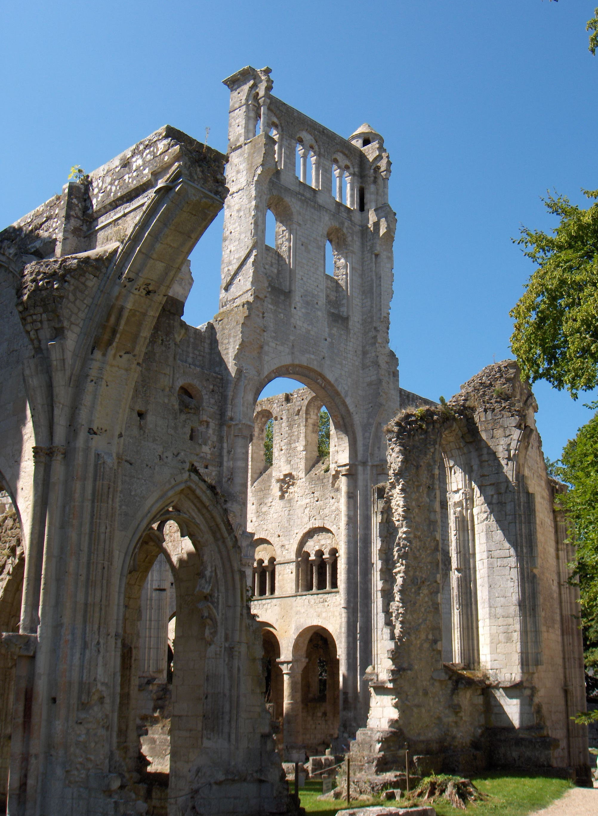 Abtei von Jumièges (Frankreich, Dept. Seine-Maritime), Ruine. Querschiff der Abteikirche, Westmauer des Turms, 11. Jh. (romanisch), gotischer Chor aus dem 13. Jh.